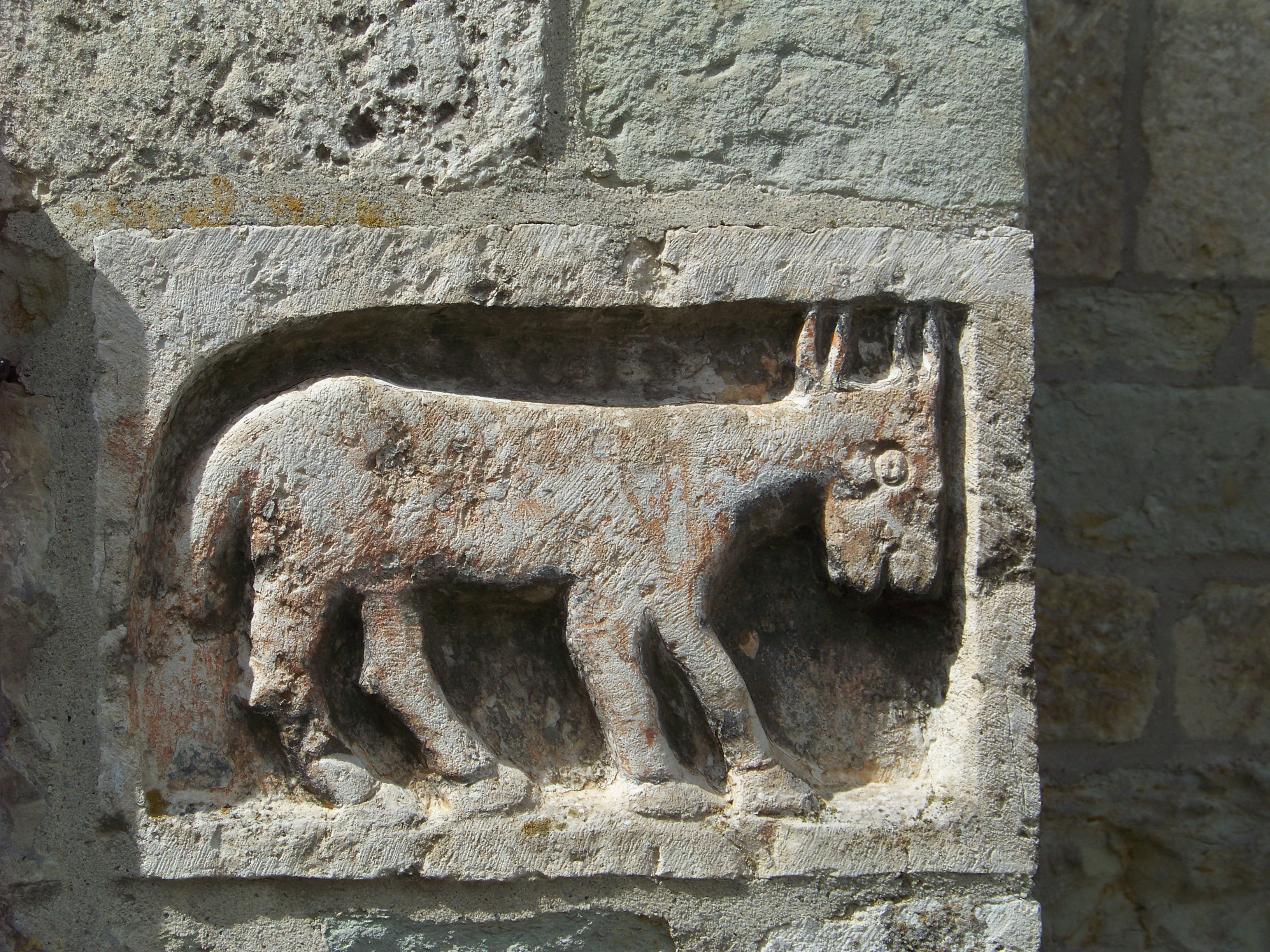 Langquaid Marktplatz 14. Katholische Pfarrkirche St. Jakob d. Ä. Saalkirche mit Steildach, eingezogenem Rechteckchor und Chorscheitelturm, Portalvorhalle nach Süden, Chor und Turm im Kern romanisch, 13. Jahrhundert, Langhaus spätgotisch, 15. Jahrhundert, Barockisierung der Anlage um 1740, Verlängerung nach Westen, 1917; mit Ausstattung; Seelenkapelle, rechteckiger Satteldachbau, 18. Jahrhundert. Friedhofsmauer mit Grabdenkmälern des 17. bis 19. Jahrhunderts. Außen am Turm, neben der Südostkante des Chores, Relief eines Esels aus Stein.